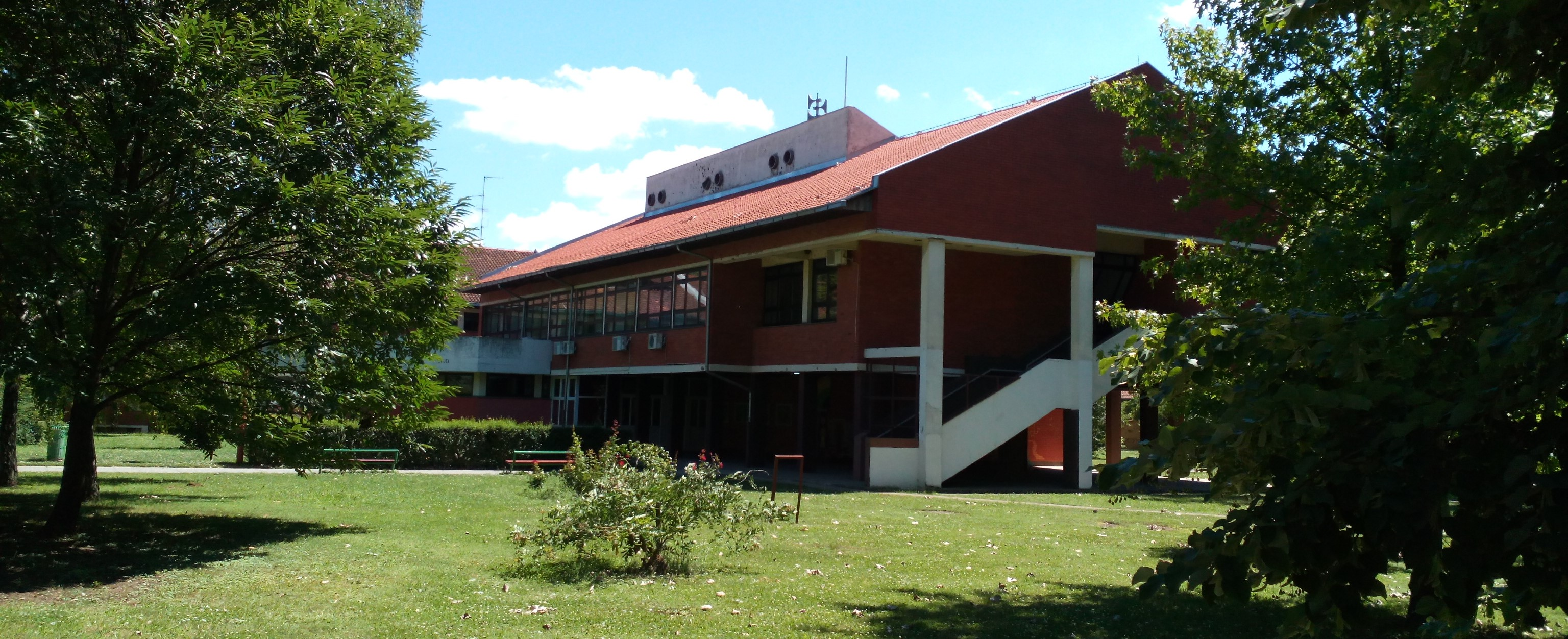 Osnovna škola Retfala.